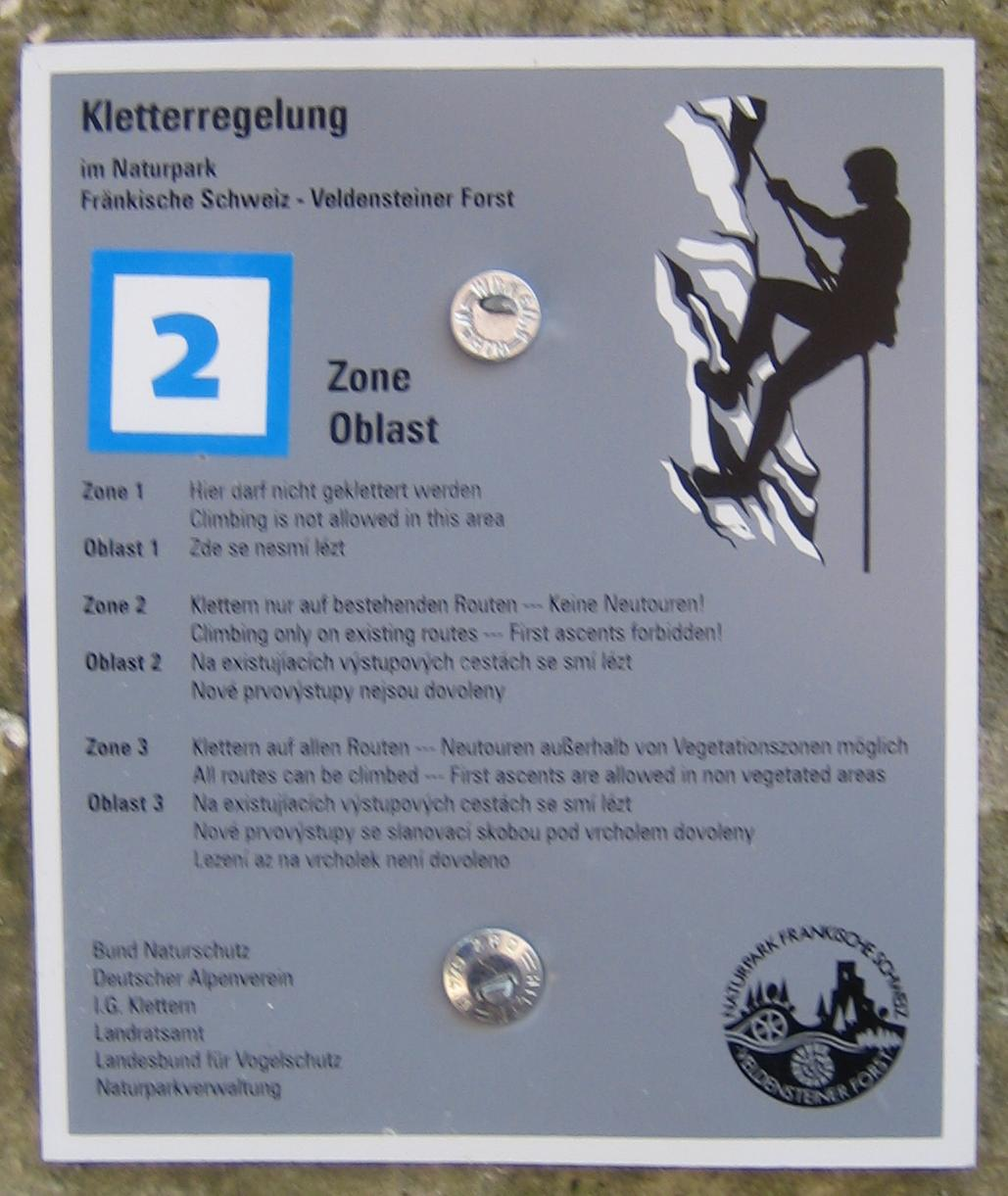 Kletterregelung in der Fränkischen Schweiz Zone 2